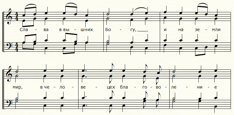 Великое славословие знаменного распева в гармонизации Чайковского (фрагмент)